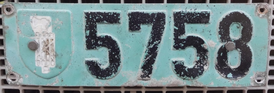 Altes Traktorkontrollschild (bis 1960) aus dem Kanton St.Gallen